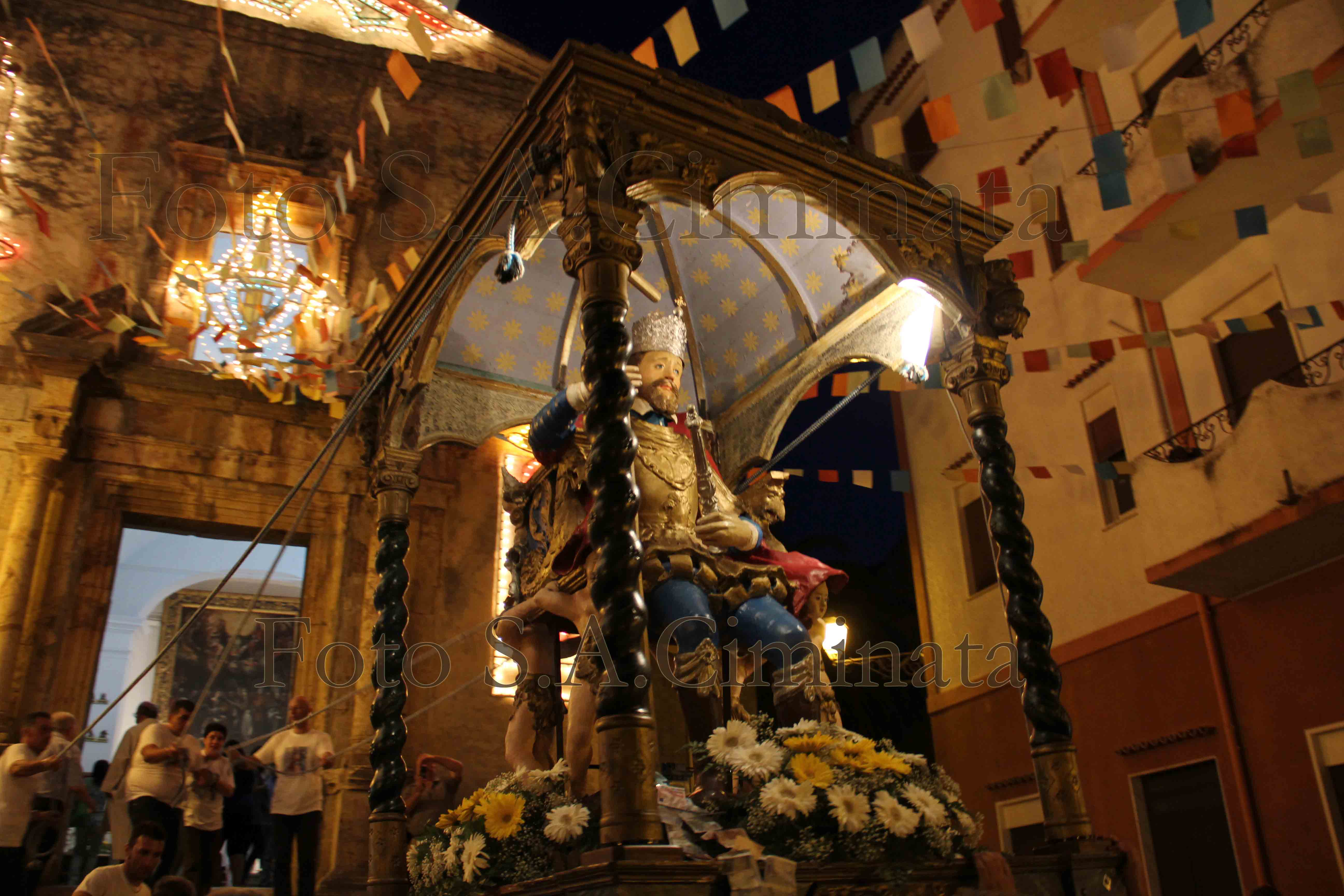 Festa S. Costantino